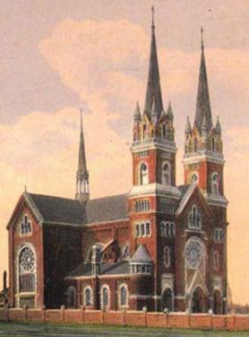 Римо-католицький собор св. Кліментія в Одесі (1899-1906 рр.)